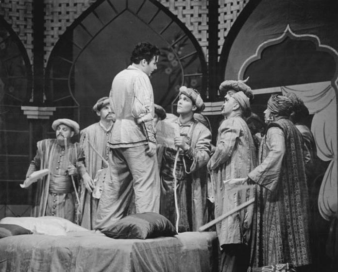 Zentralbild Hochneder 10.6.1960 2. Arbeiterfestspiele des FDGB. "Abu Hassan" von einem Arbeitertheater aufgeführt. "Abu Hassan", eine heitere Oper von Carl Maria von Weber wurde als Gastspiel des Arbeitertheaters Dresden-Niedersedlitz am 7.6.1960 im Festspielort Aue aufgeführt. Diese Operninszenierung ist die erste, die ein Arbeitertheater in Zusammenarbeit mit Berufskünstlern einstudiert hat. UBz: Szenenbild mit Abu Hassan (Peter Schreier - Staatsoper Dresden) und Gläubigern (Chor des Sachsenwerkes Niedersedlitz).